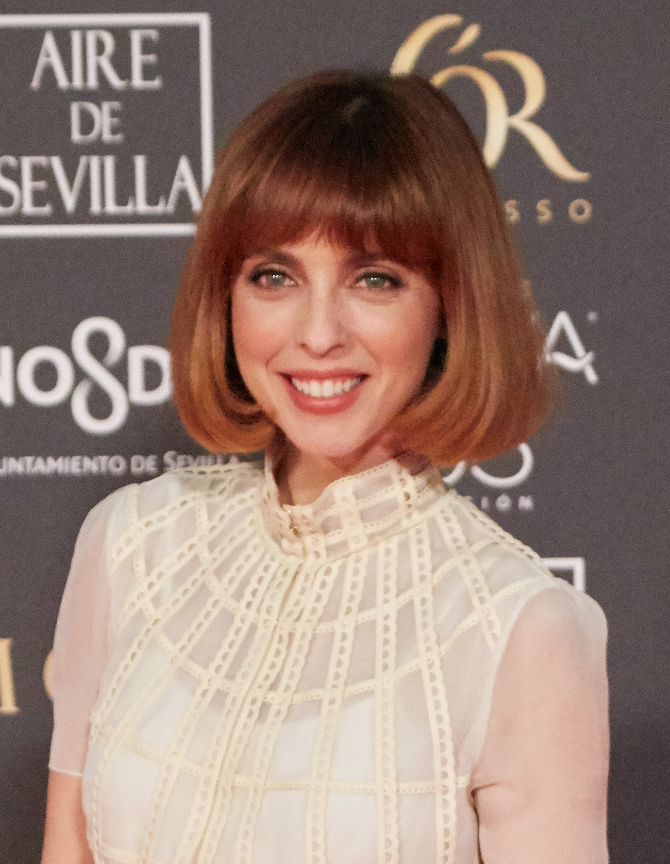 Leticia Dolera en la alfombra roja de los Premios Goya celebrados en Sevilla en Febrero 2019